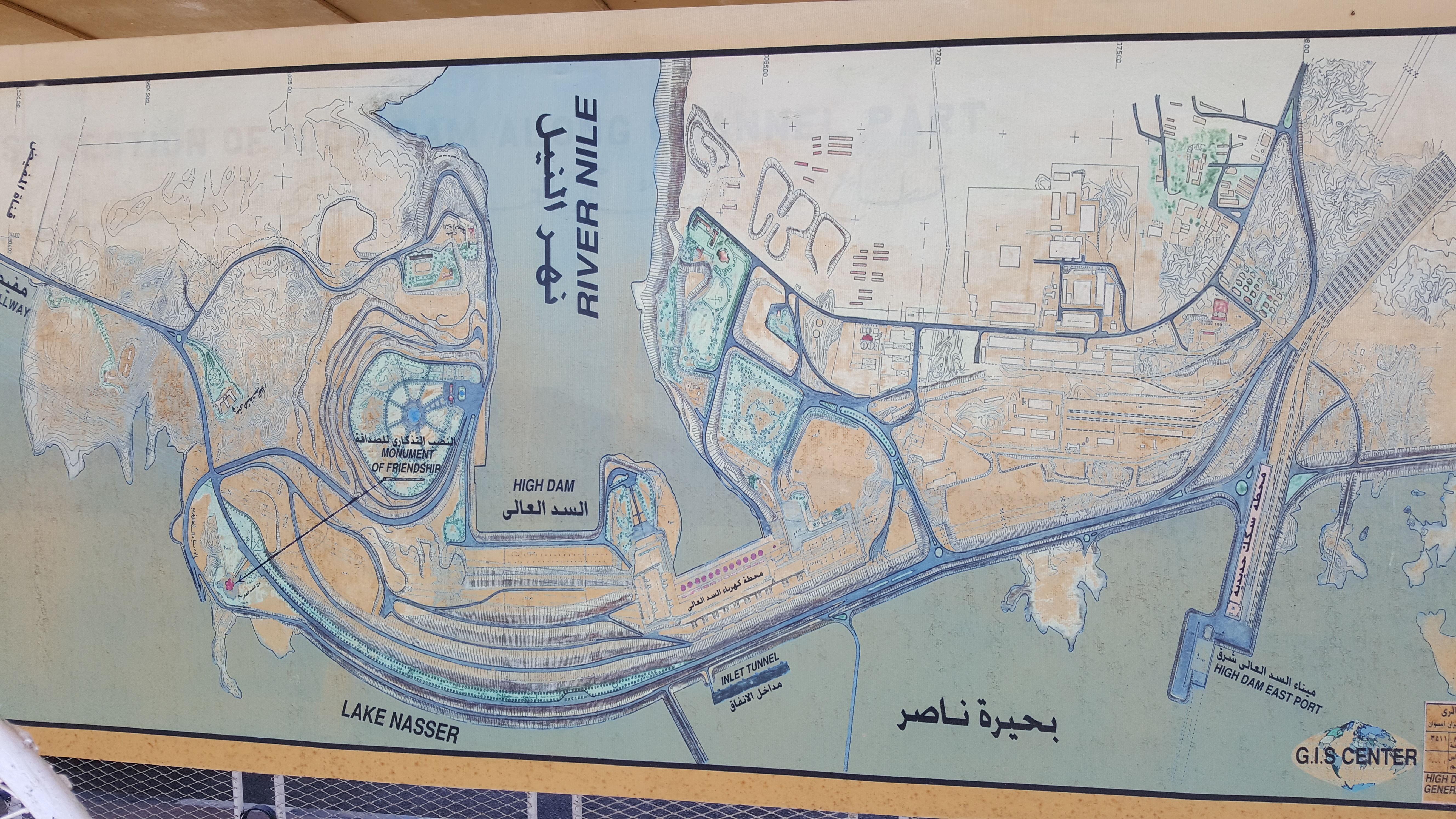 Aswan High Dam